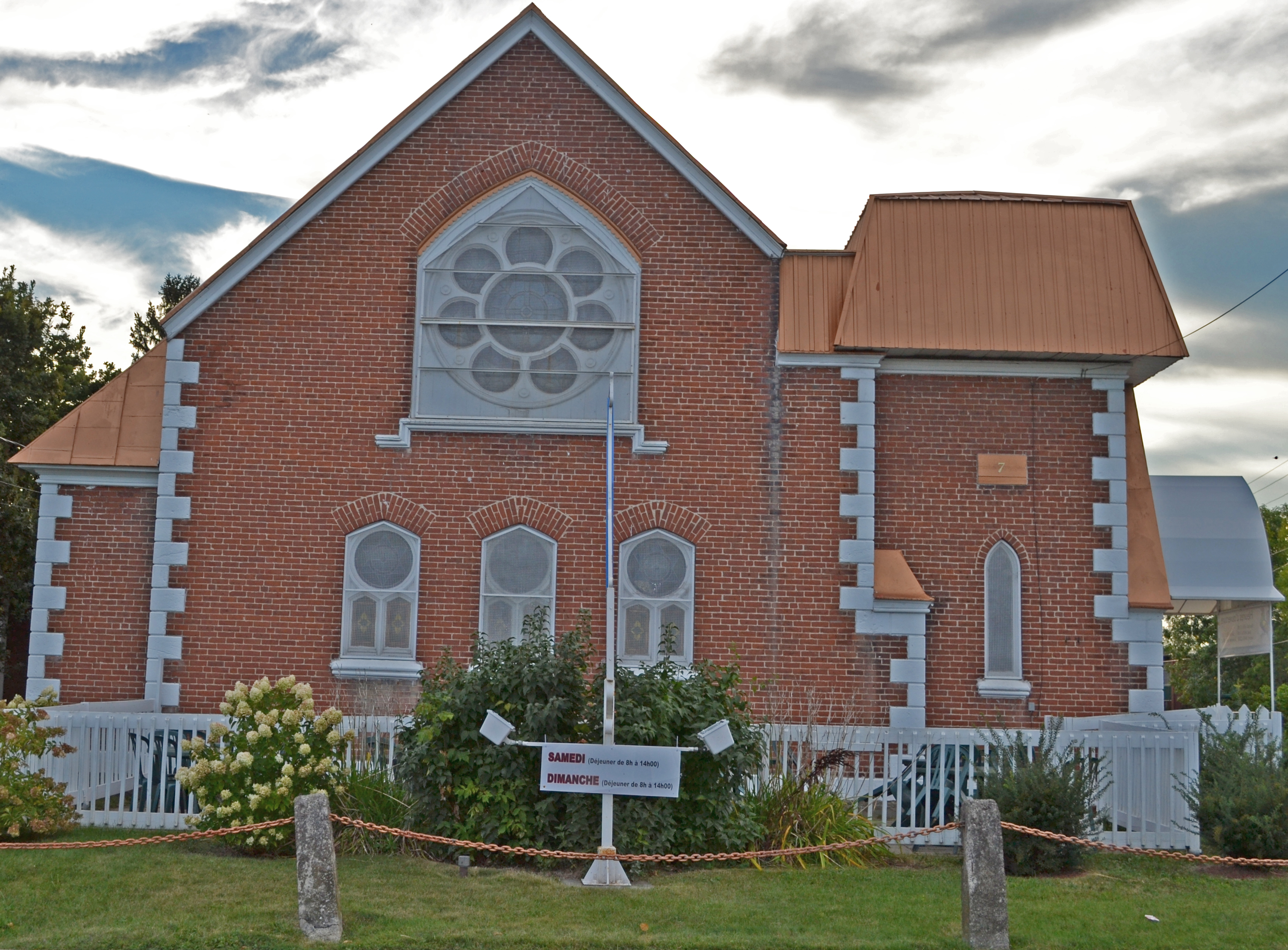 L'ancienne église anglicane Saint-Saviour est un lieu de culte anglican construit entre 1880 et 1882.